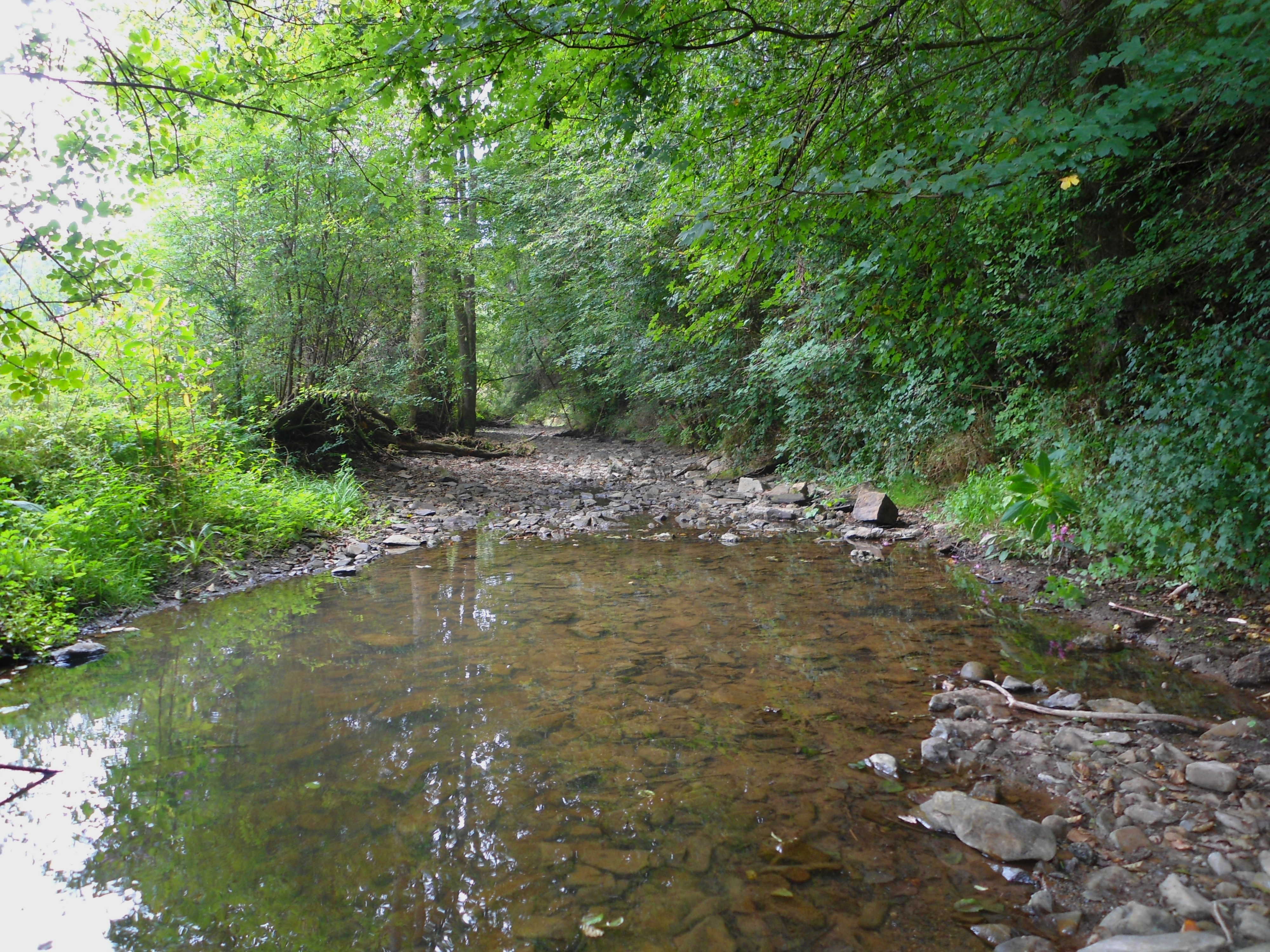 Perte de la Lembrée à My (Ferrières), Région de la Calestienne